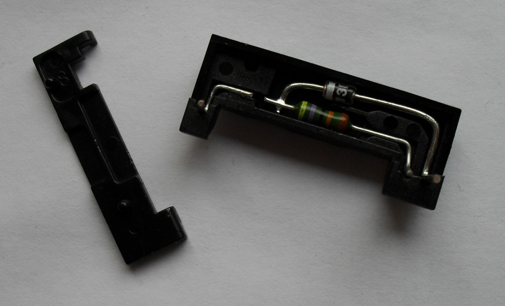 Innenleben eines Passiven Prüfabschlusses der Bundespost.